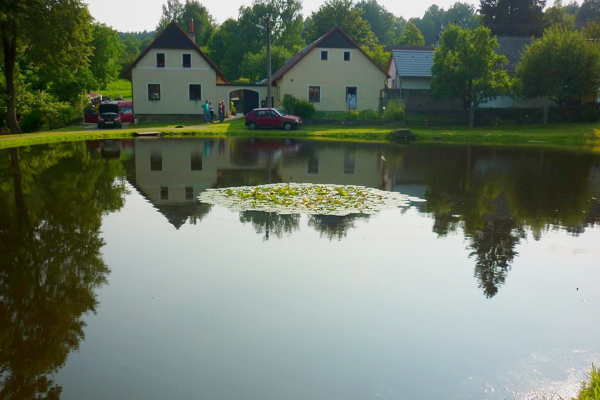 Horní Radíkov - návesní rybník s lekníny